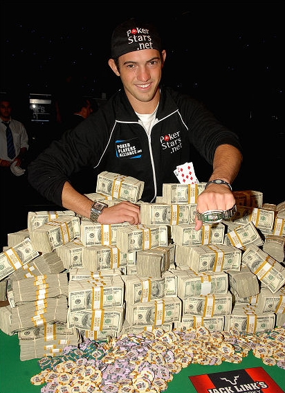 Joe Cada gagne le Main Event WSOP 2009